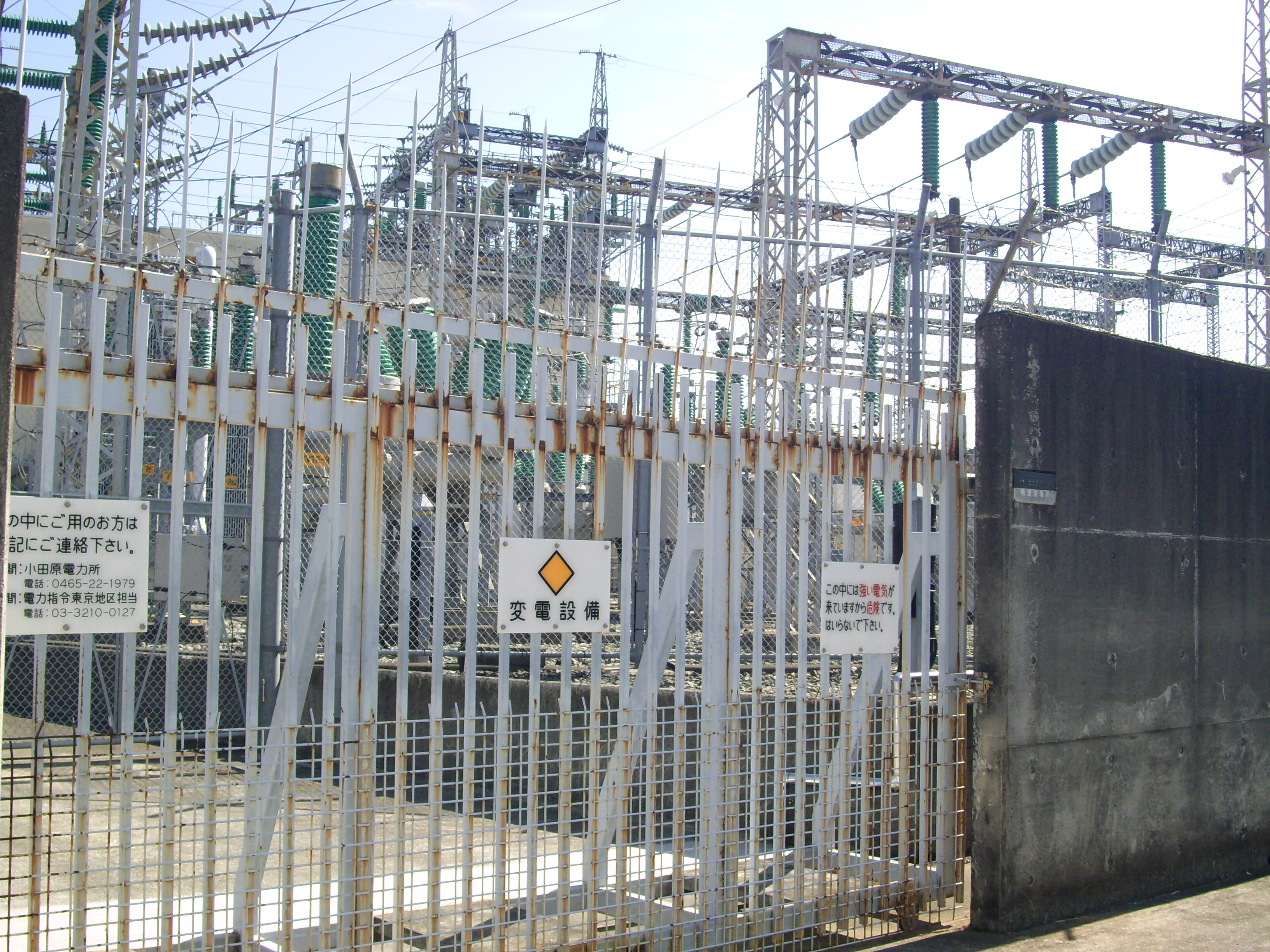 東海道新幹線鴨宮モデル線に合わせて造られ、開業後も継続使用されている鴨宮変電所。新幹線運行管理システムの装置を設置する信号機械室も兼ねる。 ㊟カメラを起動すると日付機能が出荷時のものに初期化されるため、ファイル履歴の撮影日時とメタデータの原画像データの生成日時が異なります